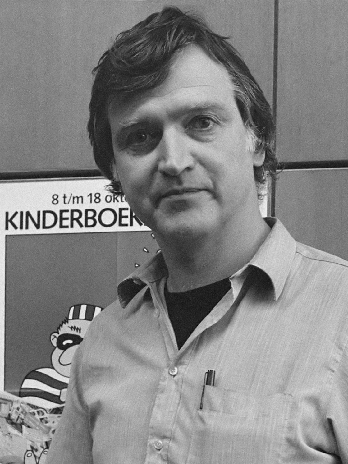 Persbijeenkomst ivm komende kinderboekenweek in Adam; Karel Eykman , met zijn kinderboekenweekgeschenk 22 september 1986